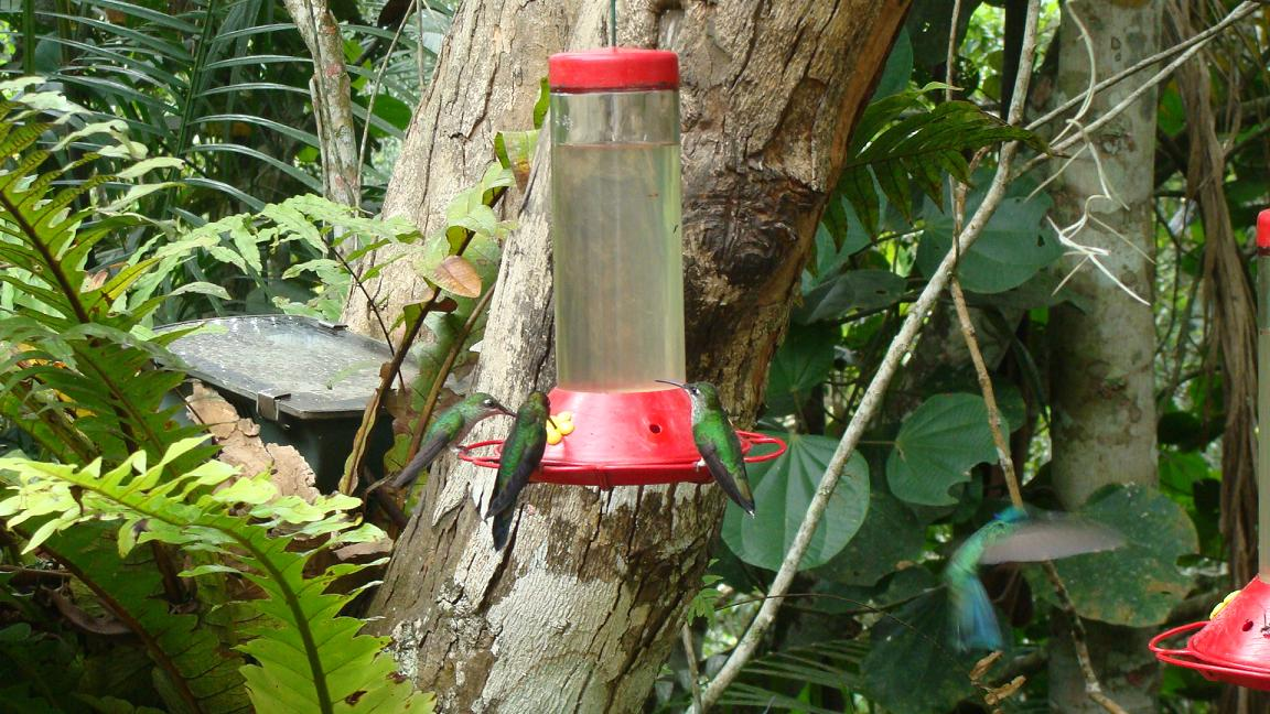 Colibríes libando en un señuelo de flor con agua azucarada. A pesar de la velocidad de apertura de la cámara, casi no se distingue un colibrí volando abajo a la derecha